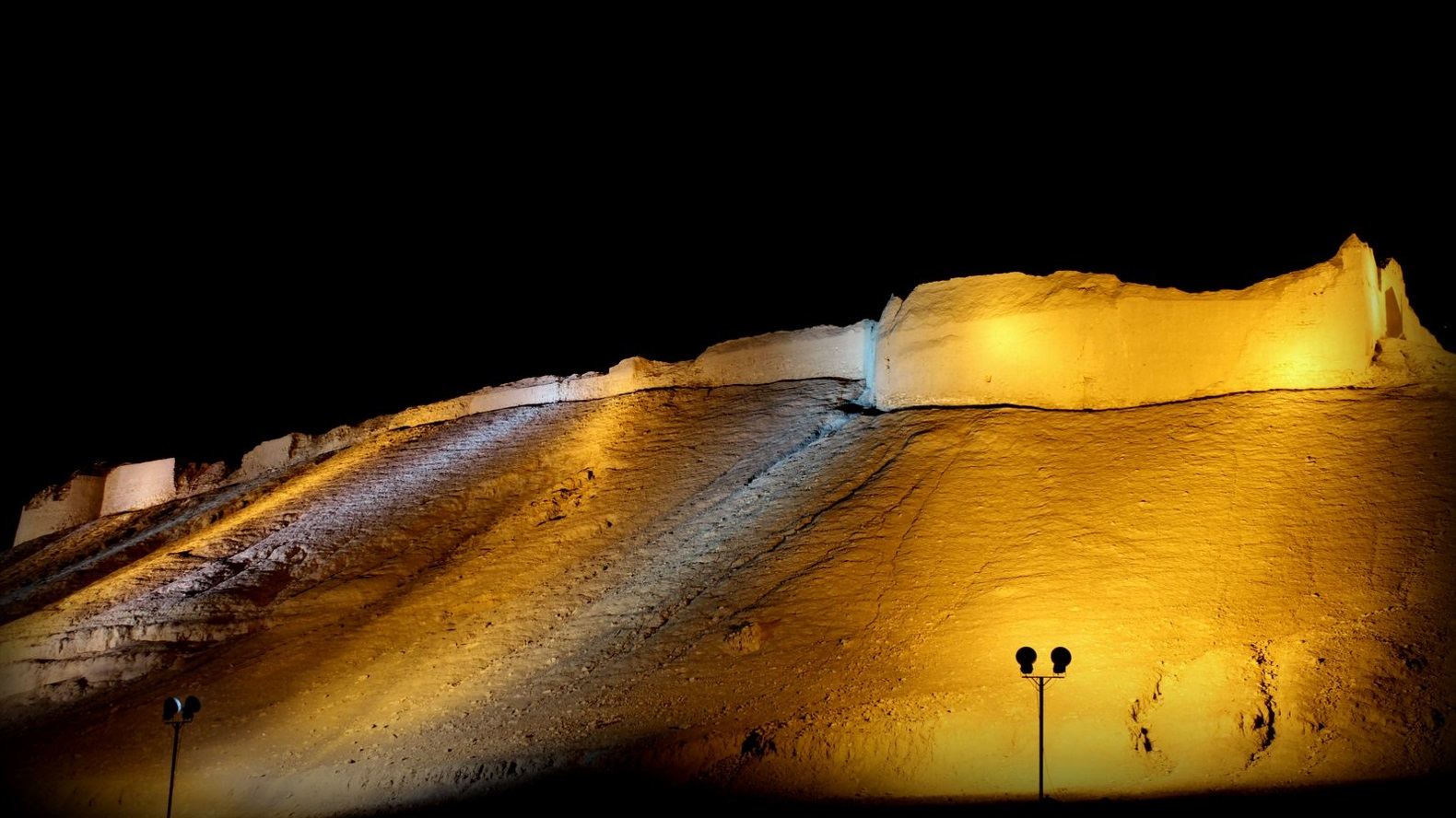 قلعه باستانی شهر لار